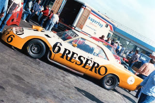 Dodge Coupé temporada 1988 Francisco Alcuaz